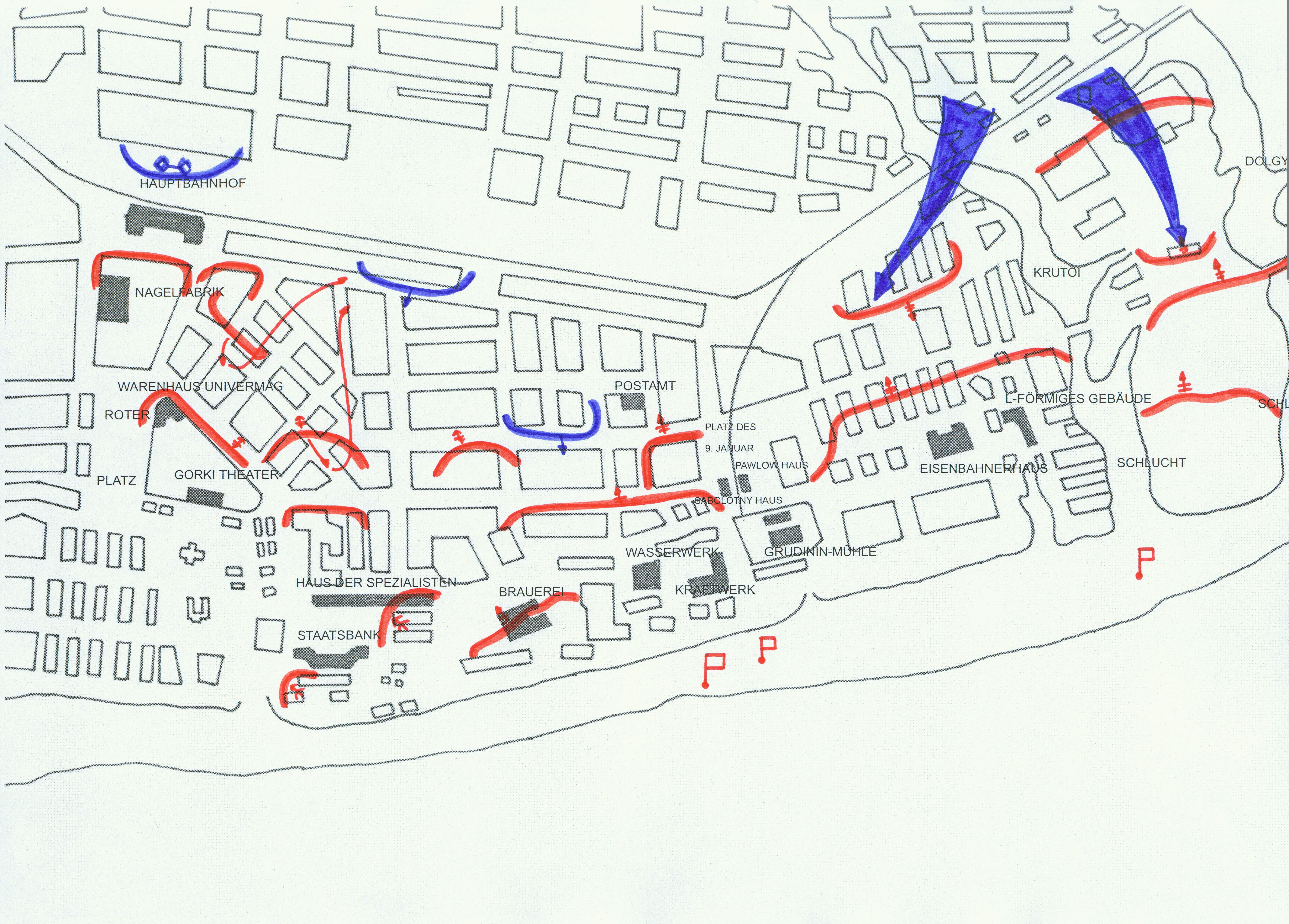 Stalingrad-Mitte 17.-19.09.1942